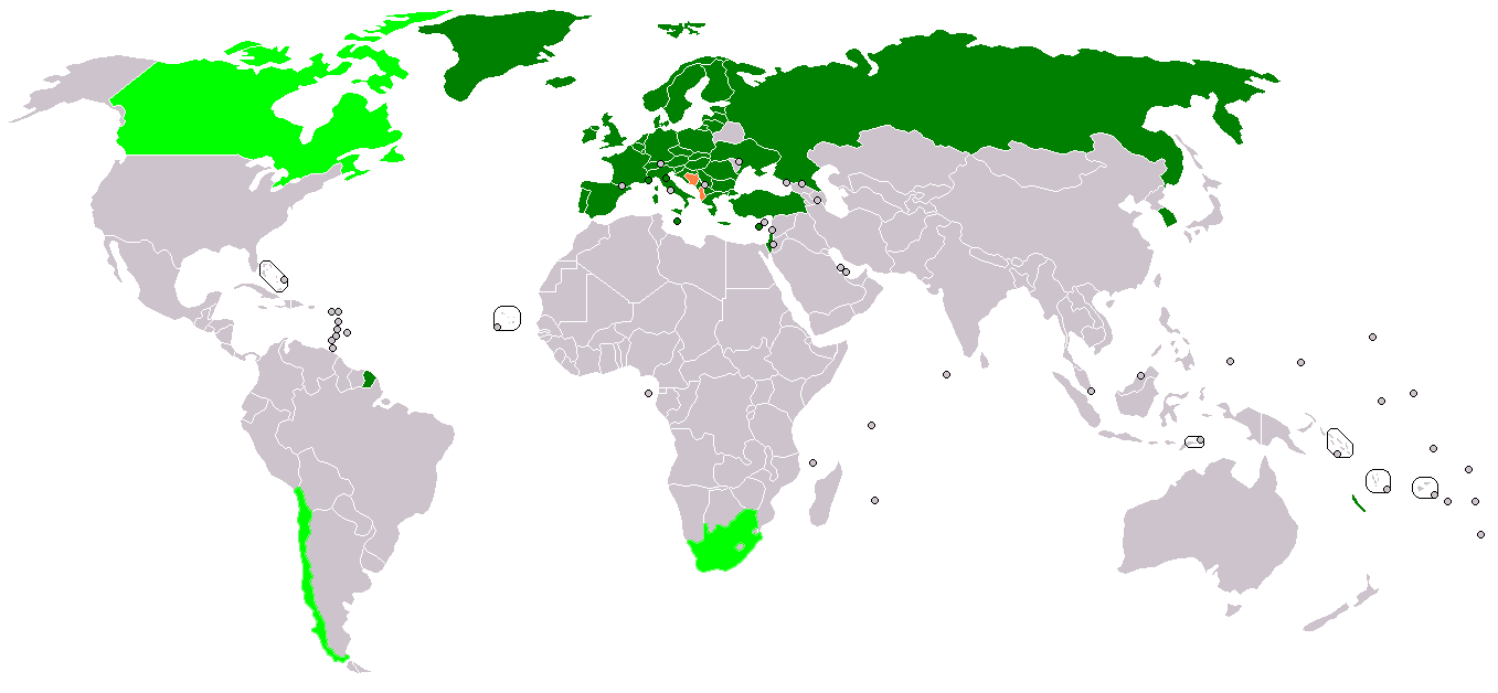 Eureka members and associates, Version of 2018